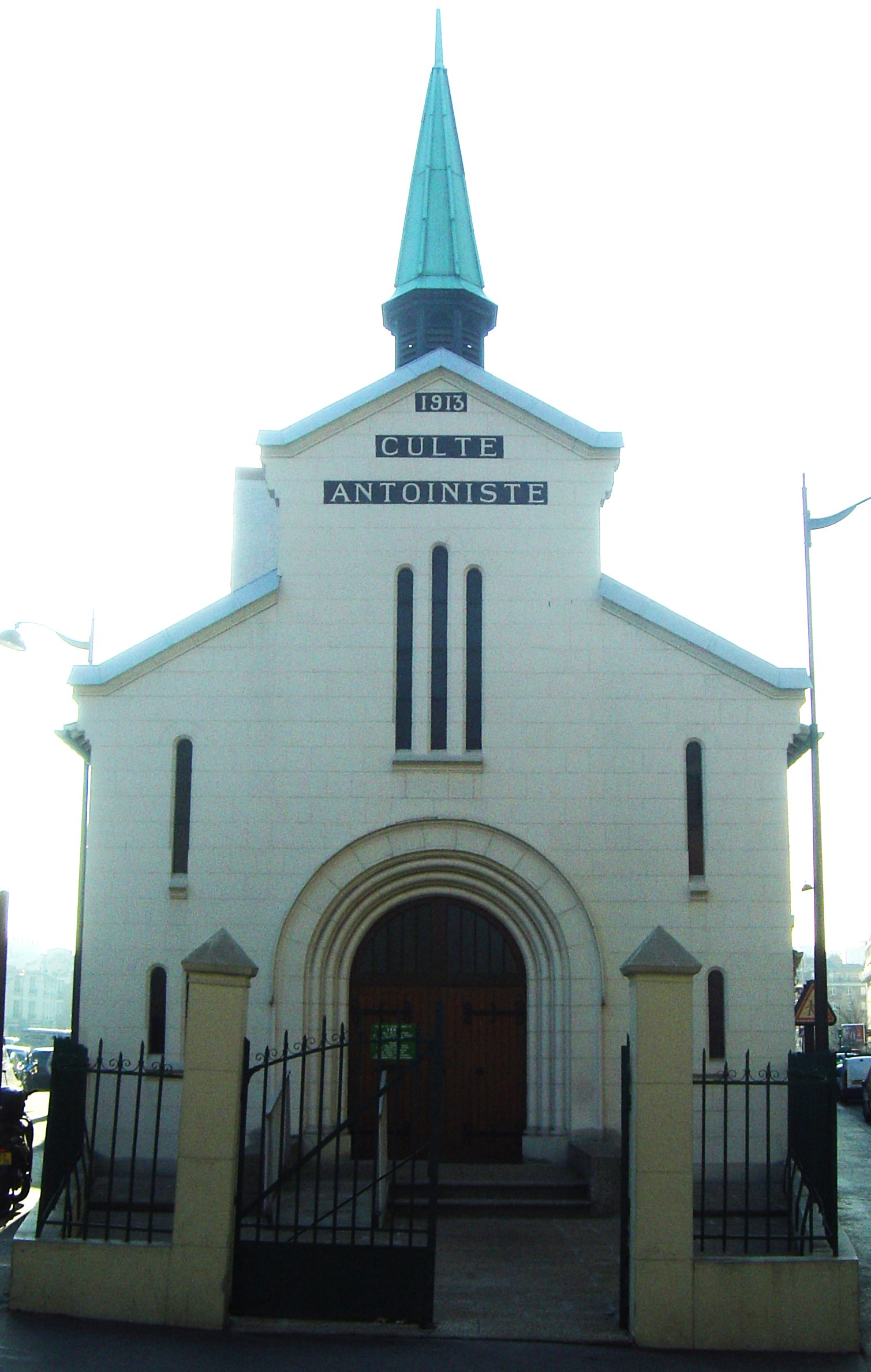 Temple du culte antoiniste, Paris 13ème